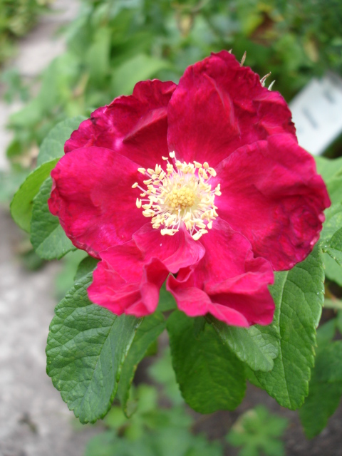 Rosa 'Carmen' (Hybrid Rugosa)